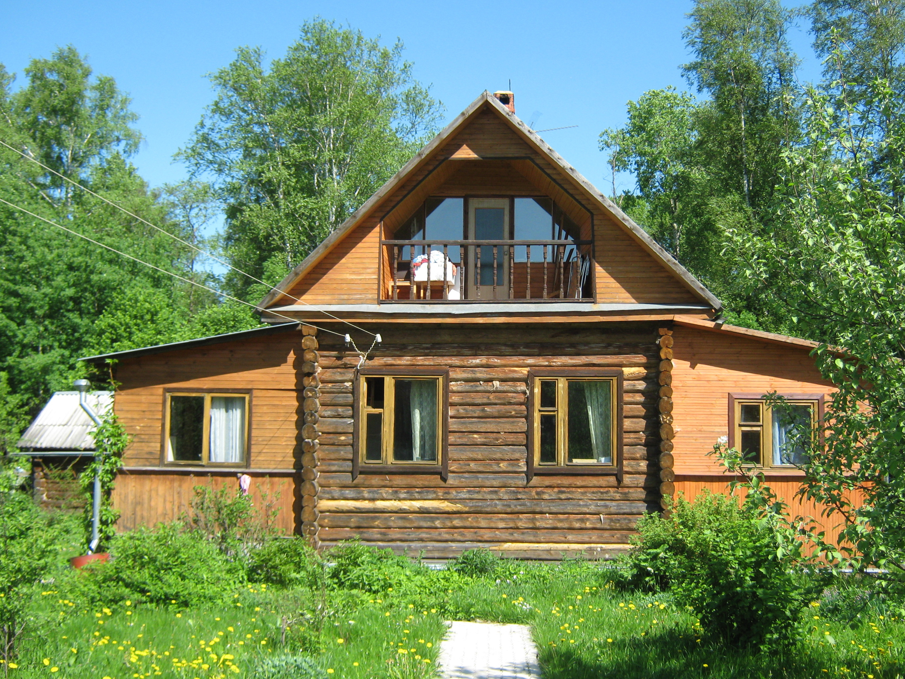 Dacha